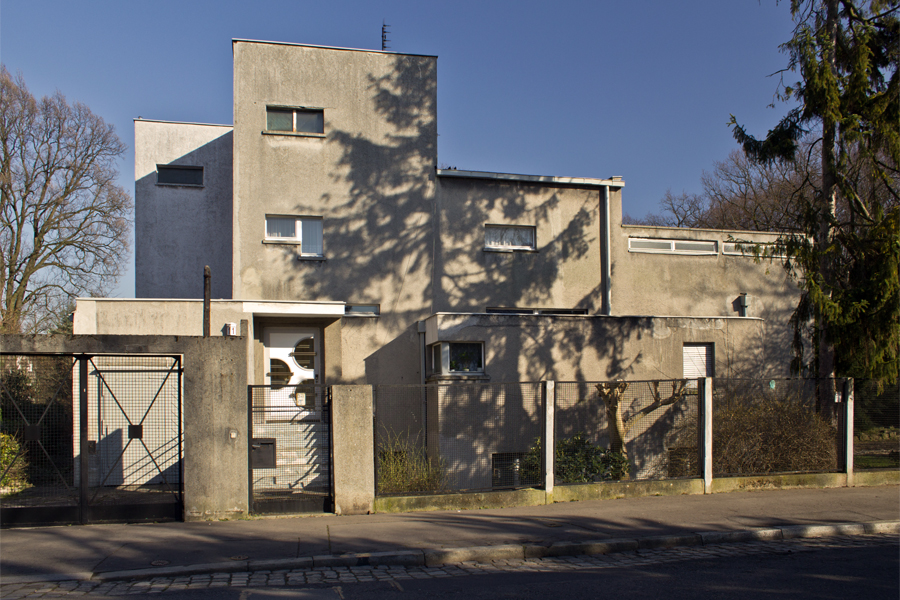 Willa przy ul. Lipińskiego 1 we Wrocławiu